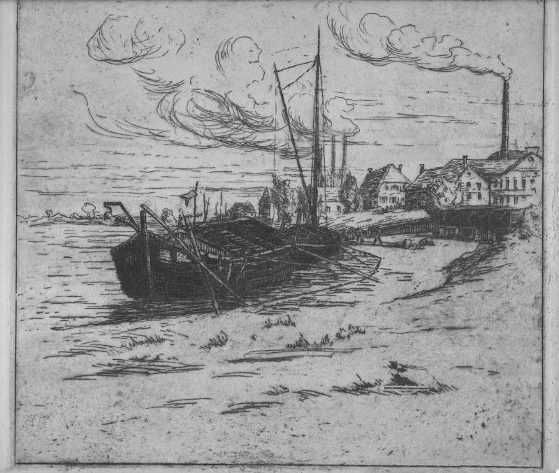 Elbkahn